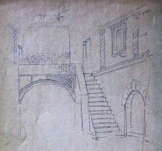 Giovanni Vacchetta, cortile interno di casa Orselli a Melle (CN)